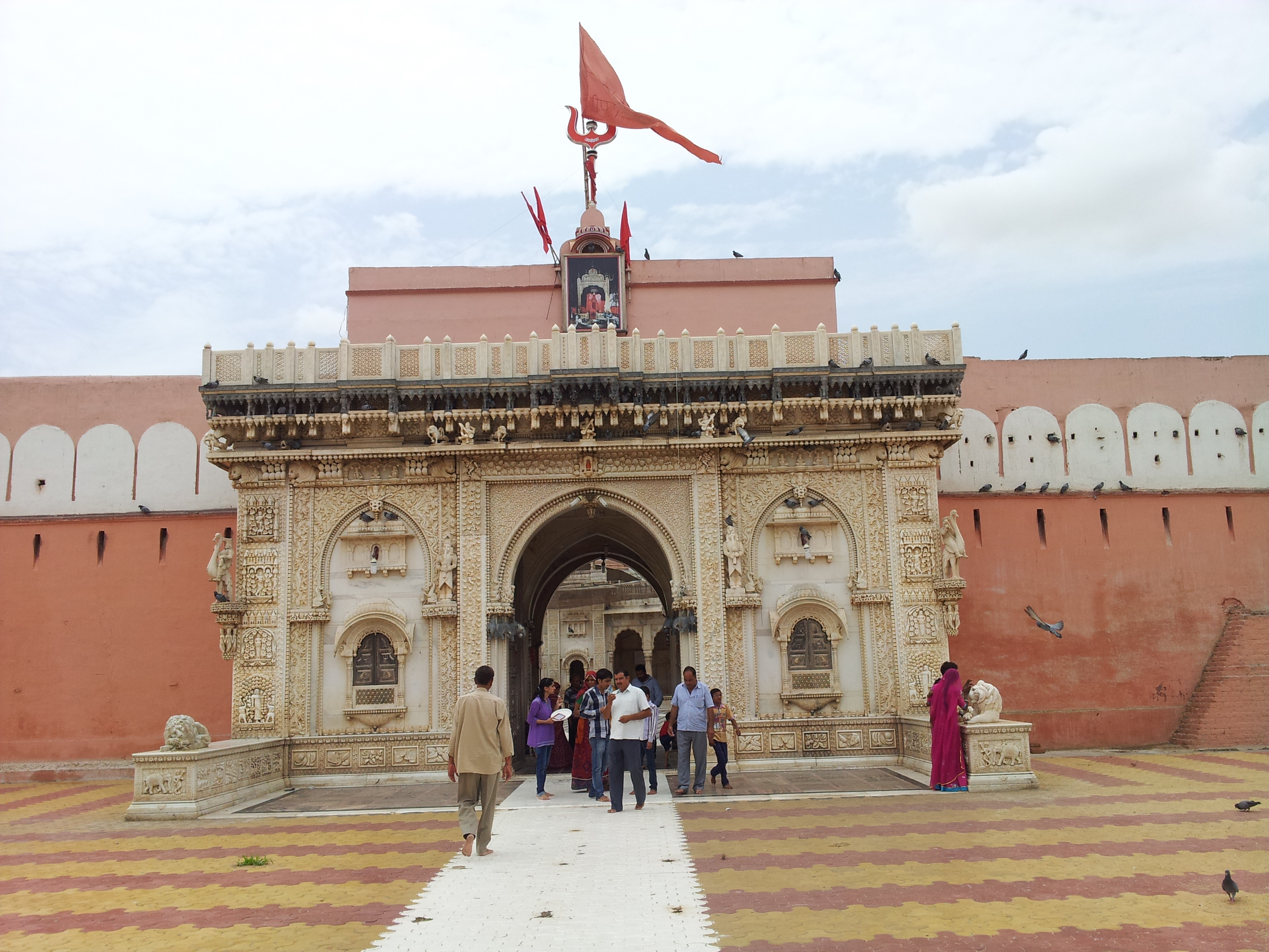 Karni Mata Temple Deshnok Near Bikaner Rajasthan India